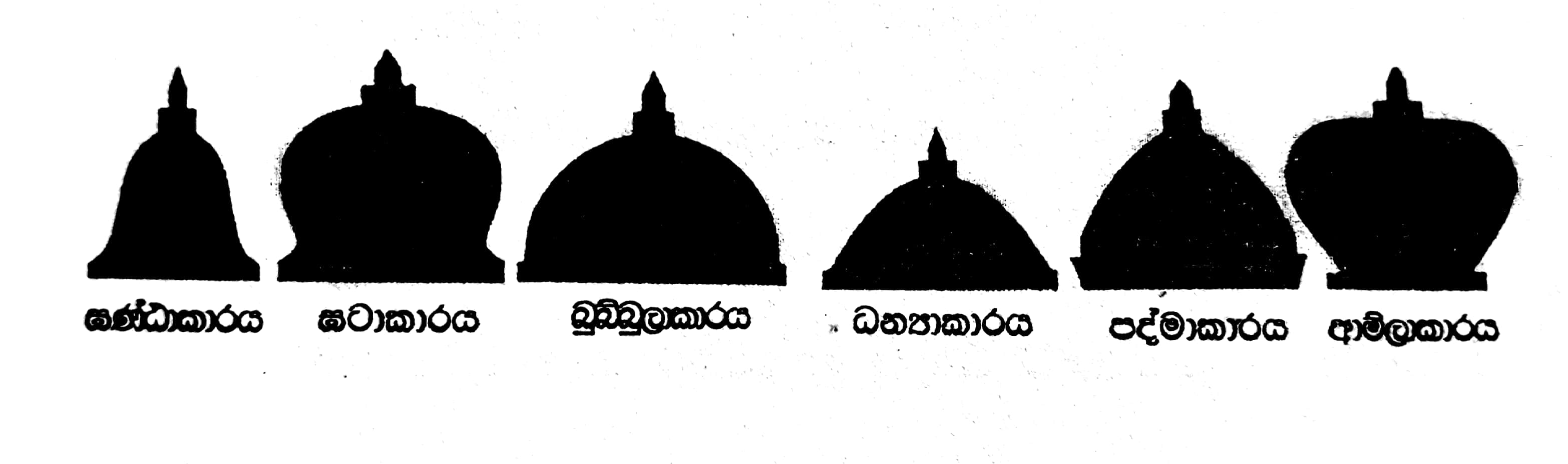 සිංහල: ස්තූප වර්ග සහ එවායේ හැඩයන්